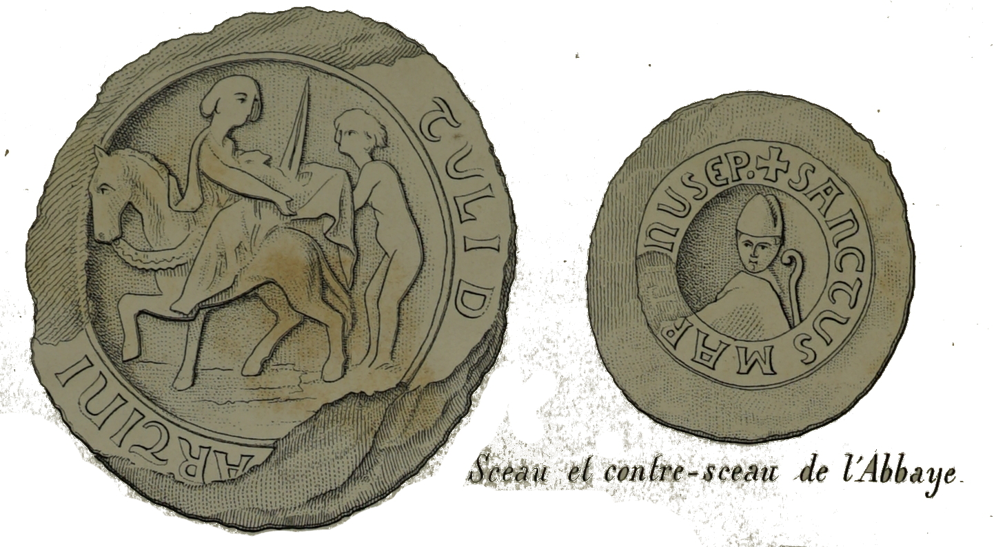 de l'abbaye